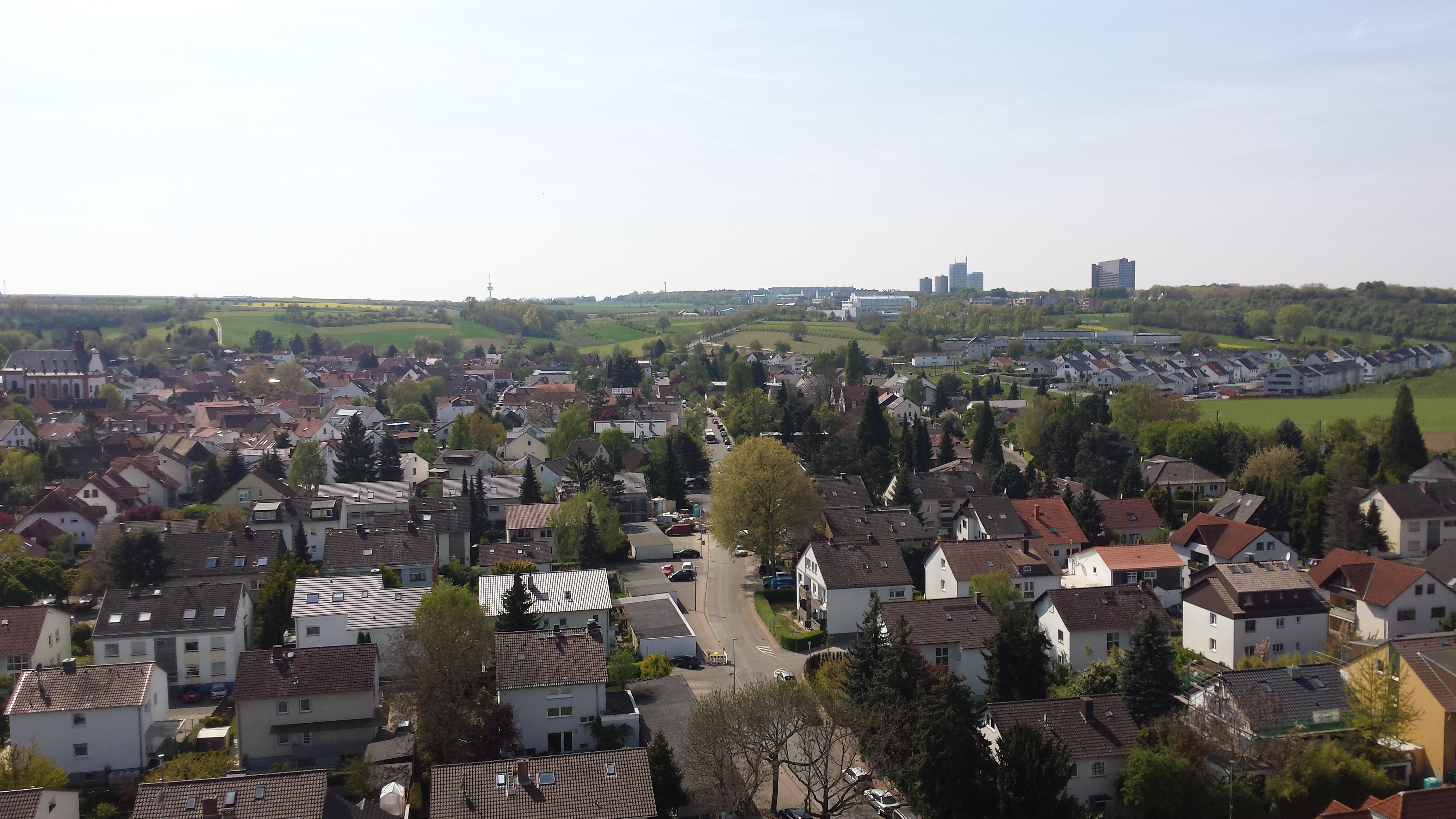 Blick auf Marienborn, im Hintergrund links Fernsehturm Essenheim, Mitte Schott Forschungs- und Laborzentrum, rechts der Lerchenberg und das ZDF